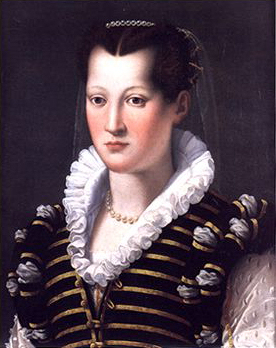 Porträt Isabella de' Medicis